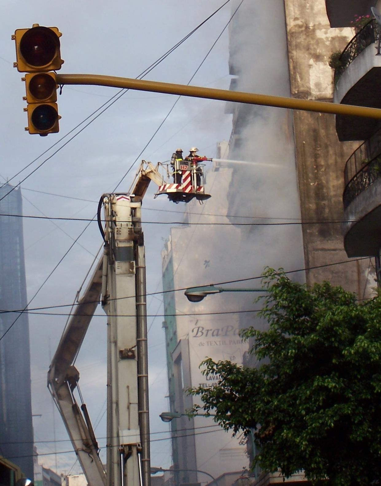 Imágenes del incendio que afectó a un edificio de Lavalle al 2257 en el barrio de Once, Buenos Aires.